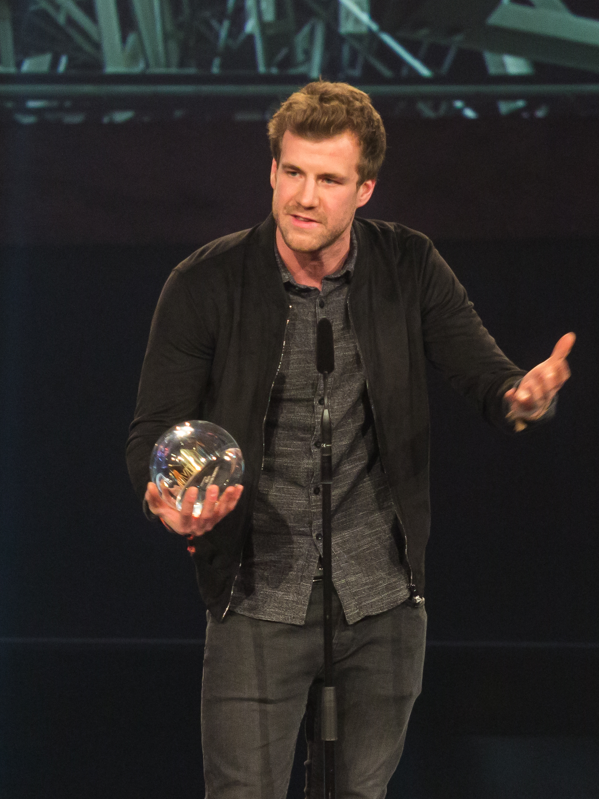 1LIVE Krone 2016 - 2015 - Show - Comedy-Krone: Luke Mockridge.